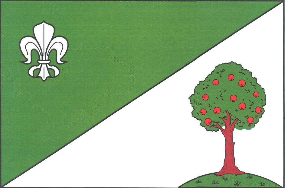 Vlajka obce Maršov